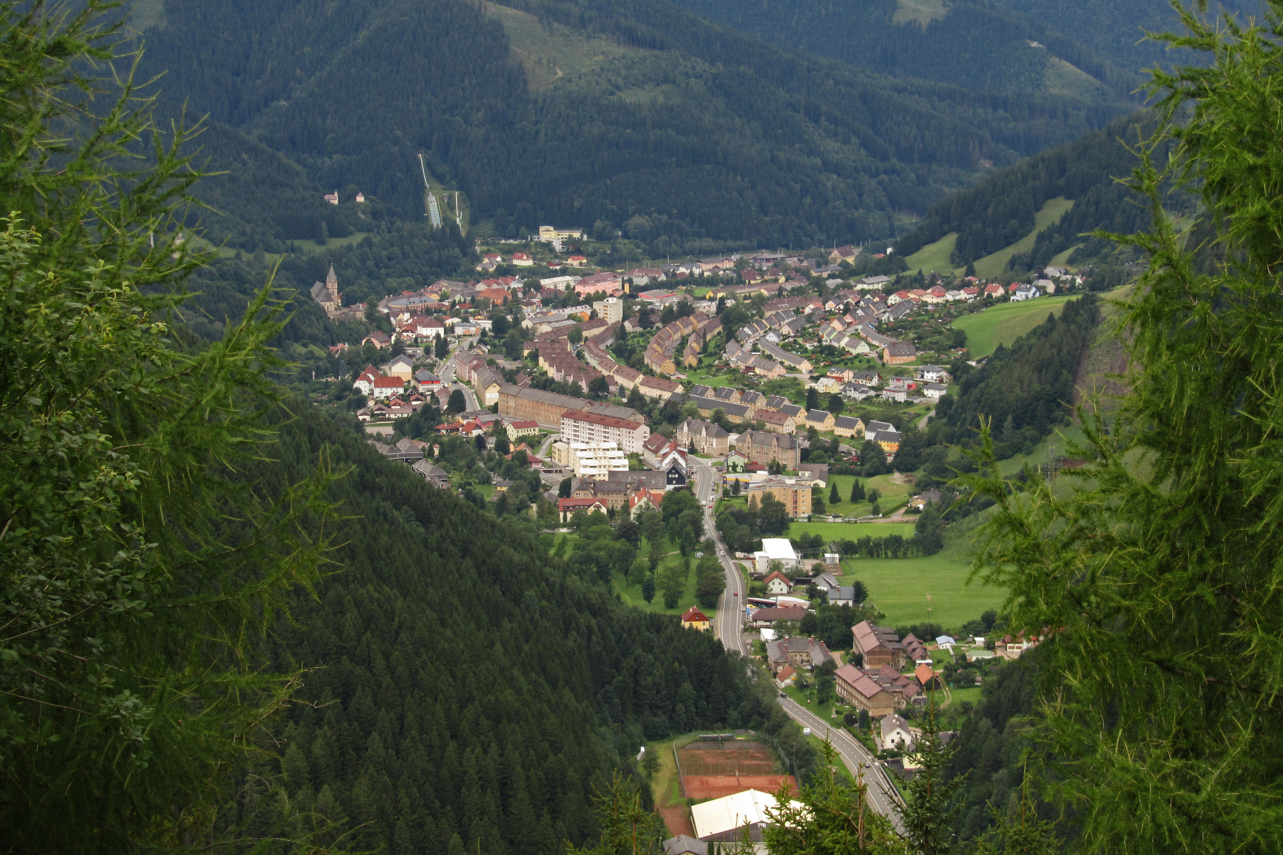 Blick auf Eisenerz (Steiermark)